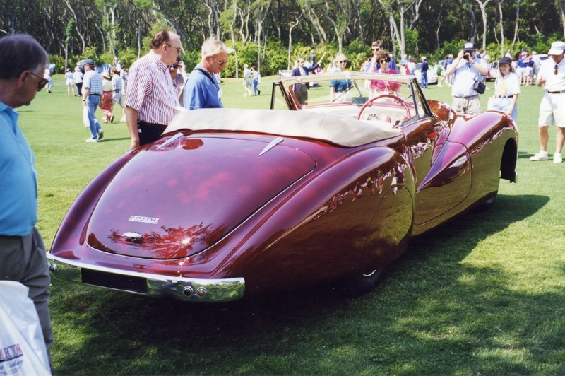 Cabriolet Delahaye 135 M 1948 carrossé par Pourtout